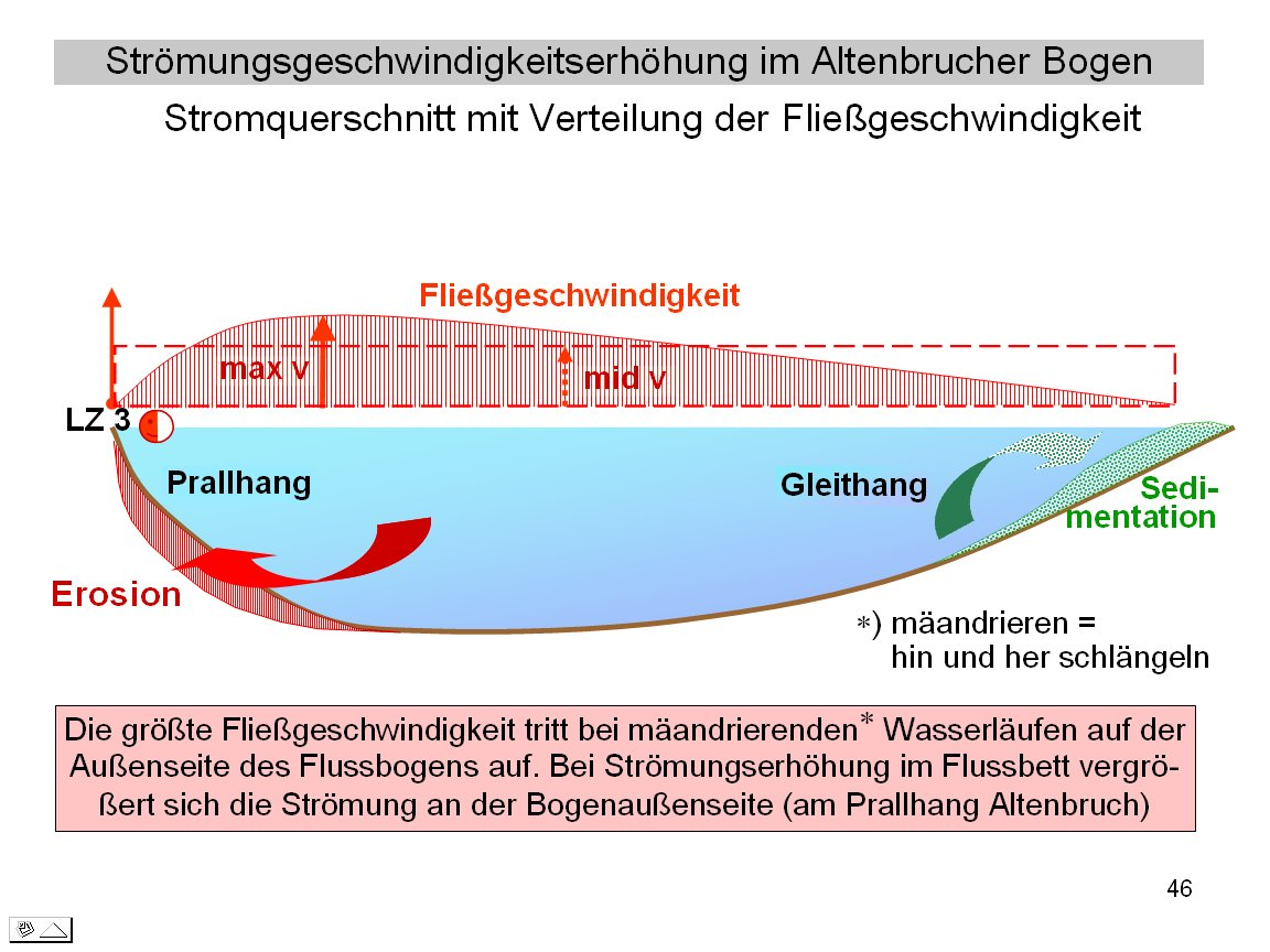 Prallhangeffekt